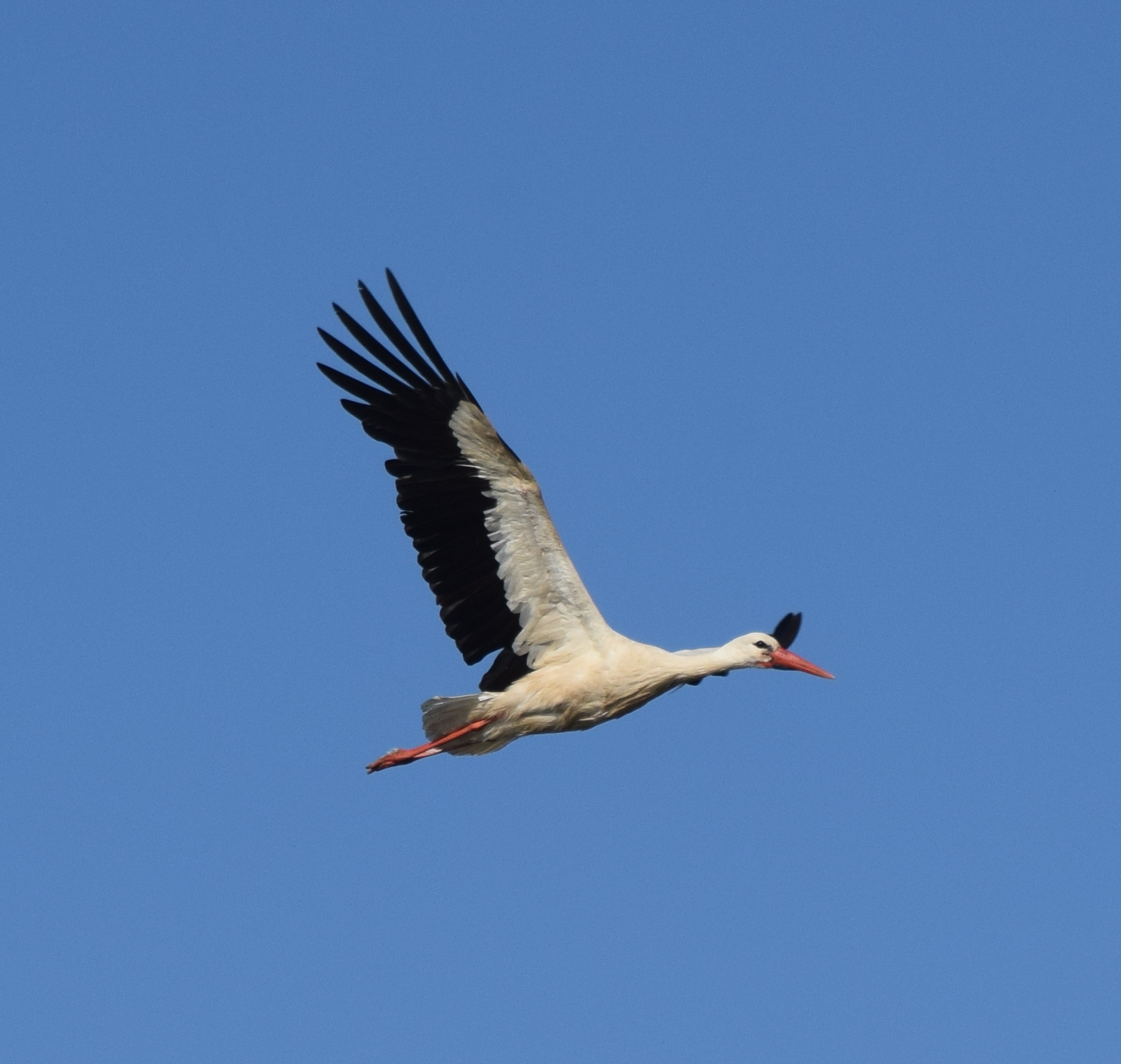 fliegender Storch am Rheinufer in Wiesbaden-Schierstein